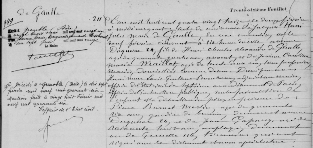 Acte de naissance de Jacques de Gaulle, né le 9 février 1893 dans le septième arrondissement de la ville de Paris (75, France).